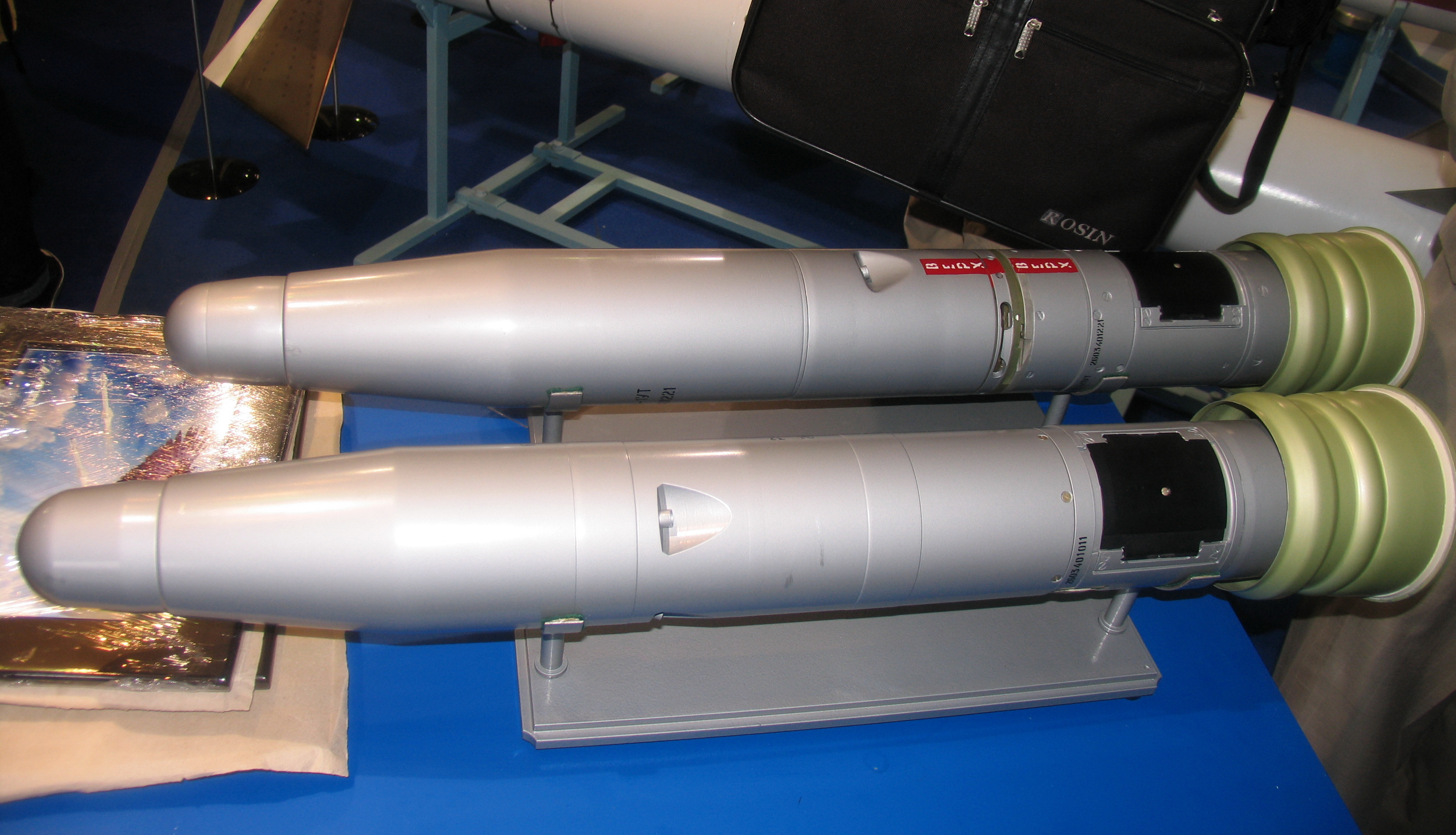 ПТУР "Комбат". МАКС-2011